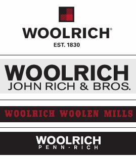 Woolrich corporate logos